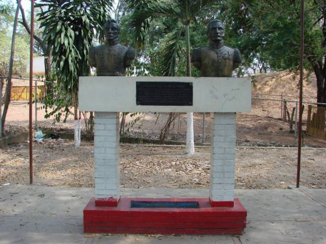 Gamelotal-PlazaSaman